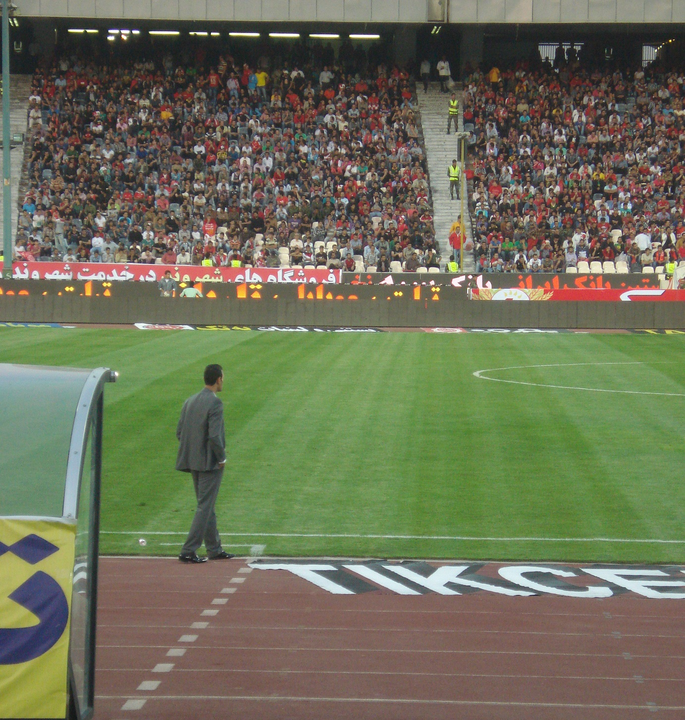 Yahya Golmohammadi, Persepolis-Malavan match, 2012-13 Iran Pro League